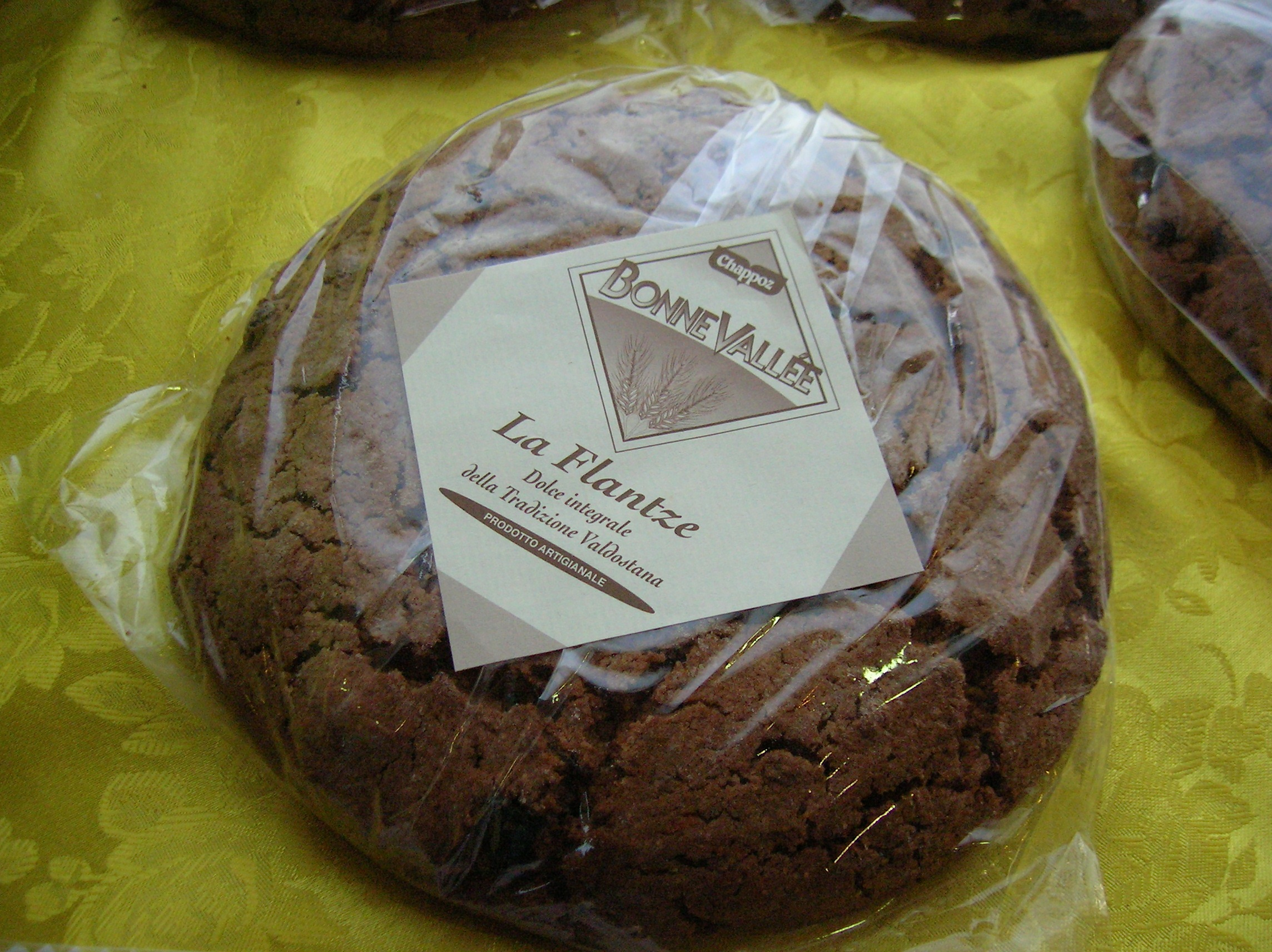 La Flantze, pane di segale e frumento dolce con uvetta, mandorle e noci. Il logo dell'azienda è sotto copyright.